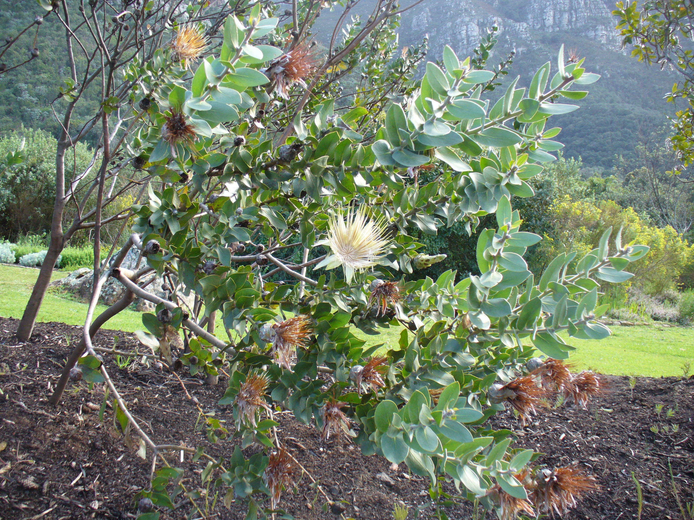 Kirstenbosch Gardens Cape Town